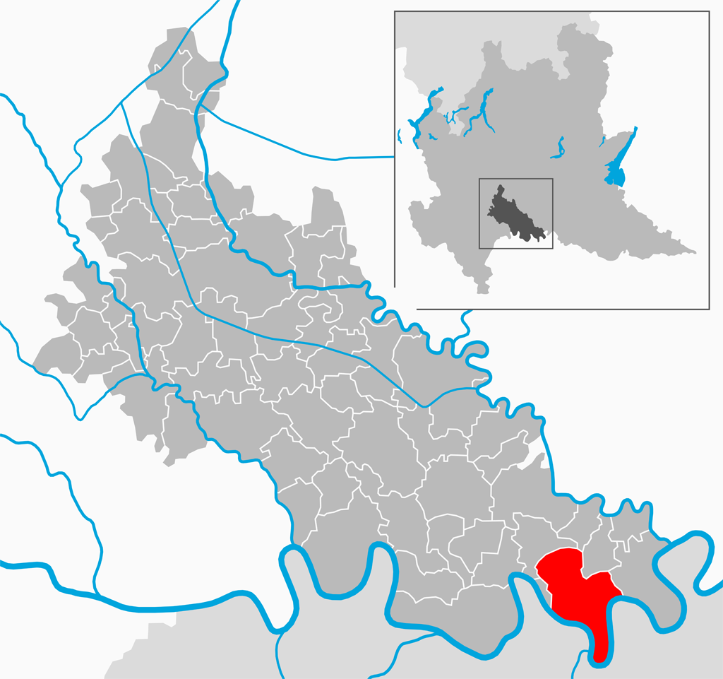 Il comune di Caselle Landi nella provincia di Lodi